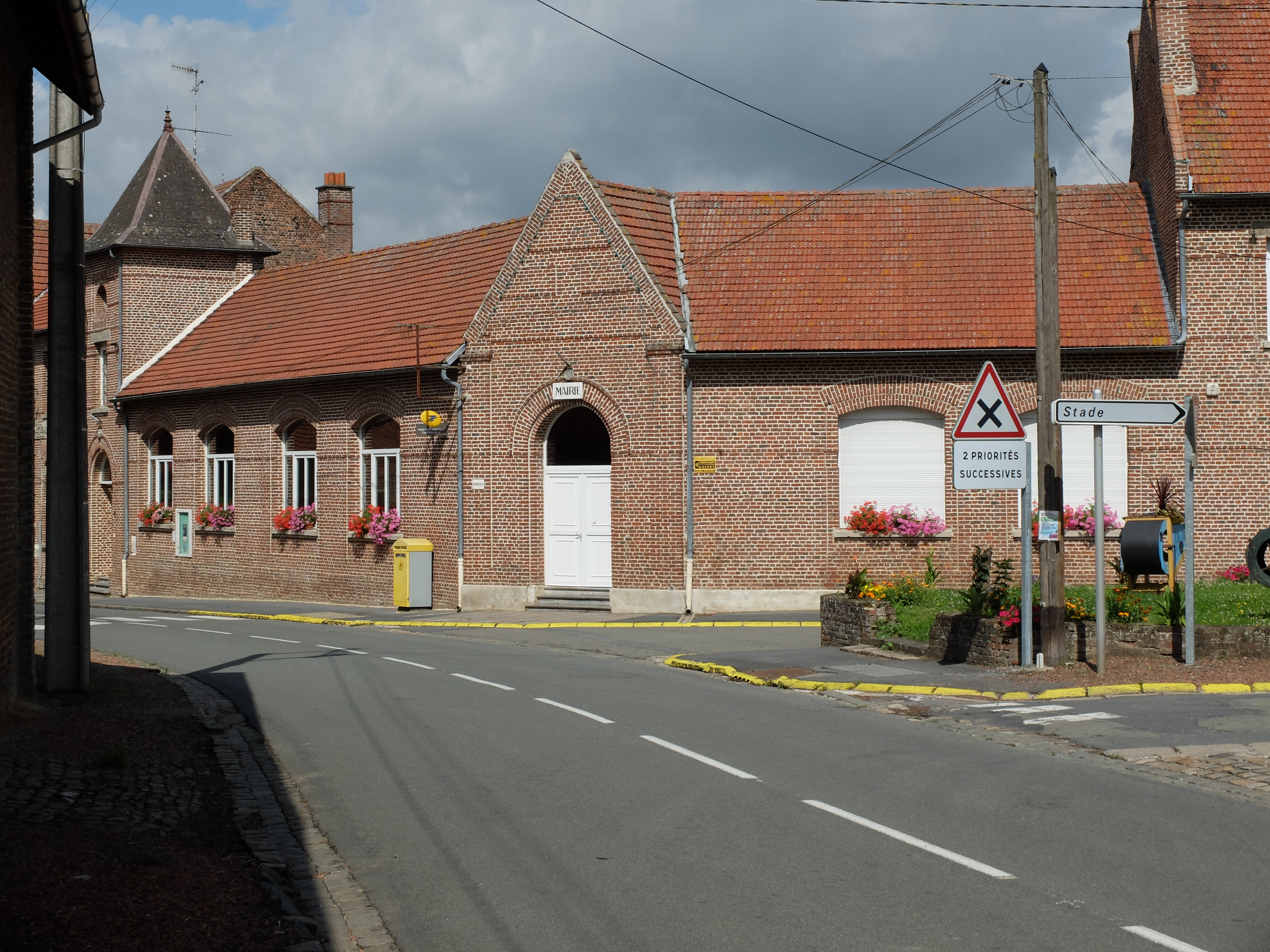 Vue de la mairie d'Abancourt (Nord).